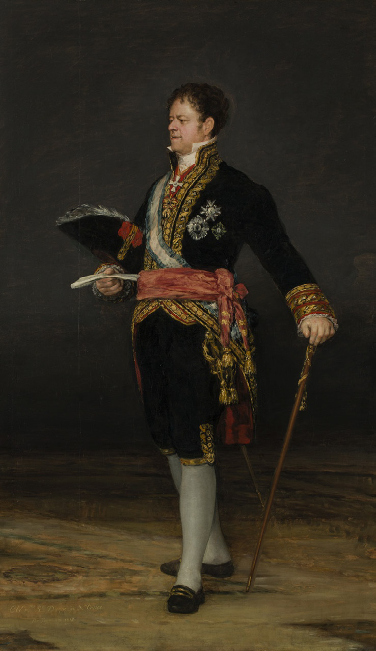 La obra representa al aristócrata, militar y politico español José Miguel de Carvajal y Manrique (1771-1828), II duque de San Carlos y conde de Castillejo y del Puerto.